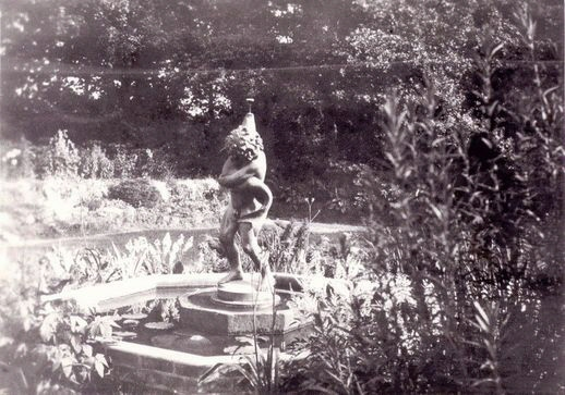 Brunnenskulptur von Piglhein in Wohltorf/Sachsenwald bei Hamburg Bruno Piglhein (Maler und Bildhauer)